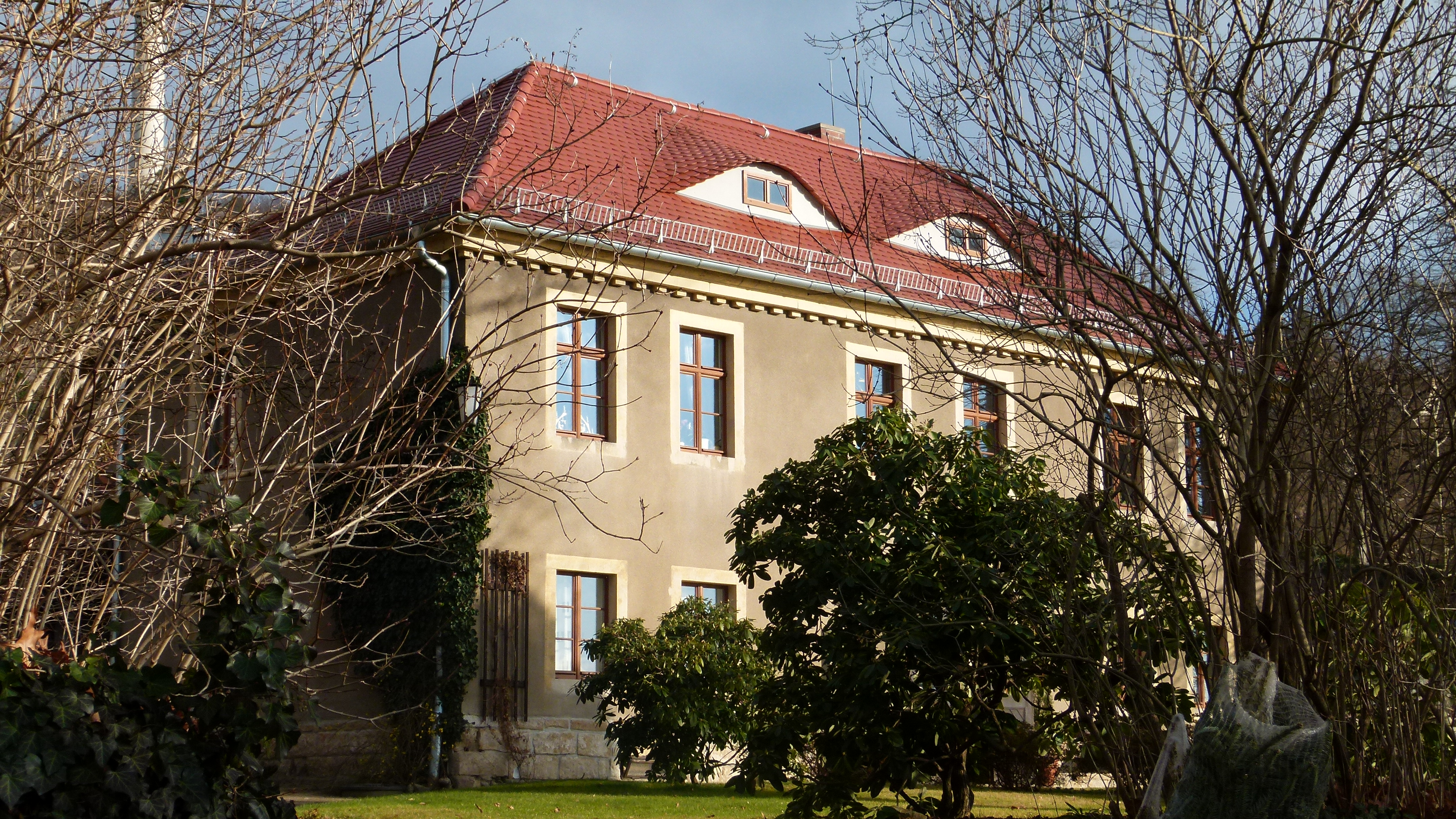 Denkmalgeschütztes Haus, Am Steinberg 15, Wachwitz, Dresden